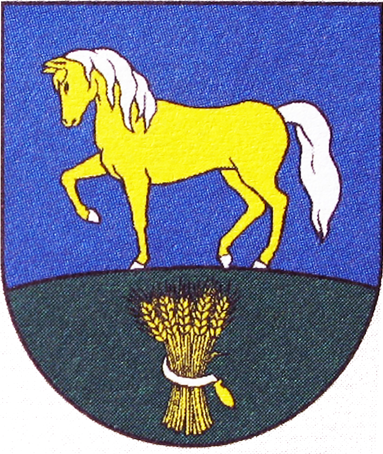 Erb obce Kobylnice (HR: R-149/2000): V modrom štíte je na zvýšenej oblej pažiti, preloženej zlatým snopom obopätým strieborným šikmým kosákom so zlatou rukoväťou, kráčajúca zlatá striebrohrivá, striebrokopytá a striebrochvostá kobyla.